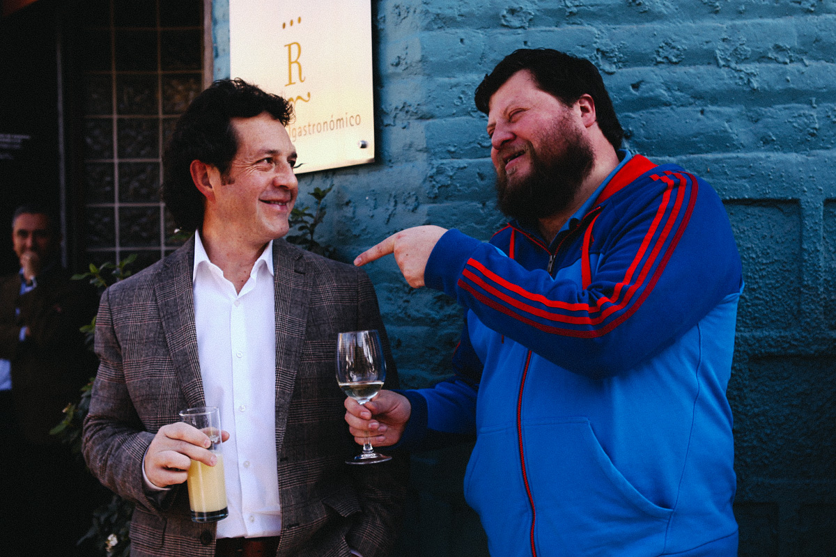 Daniel Sagüés, director de televisión chileno, y Rodrigo Salinas, comediante y dibujante.